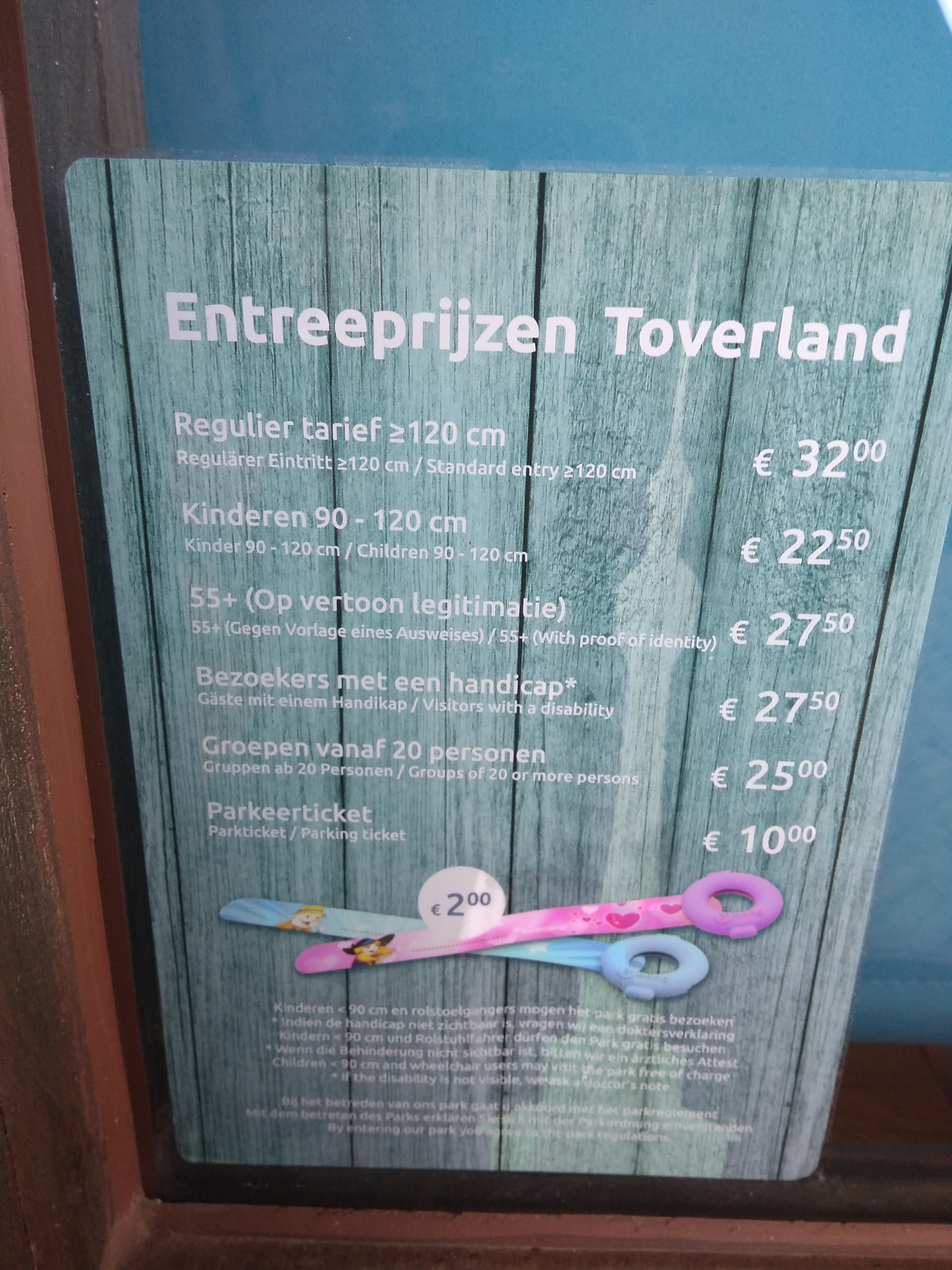 IMG_20181013_103445873